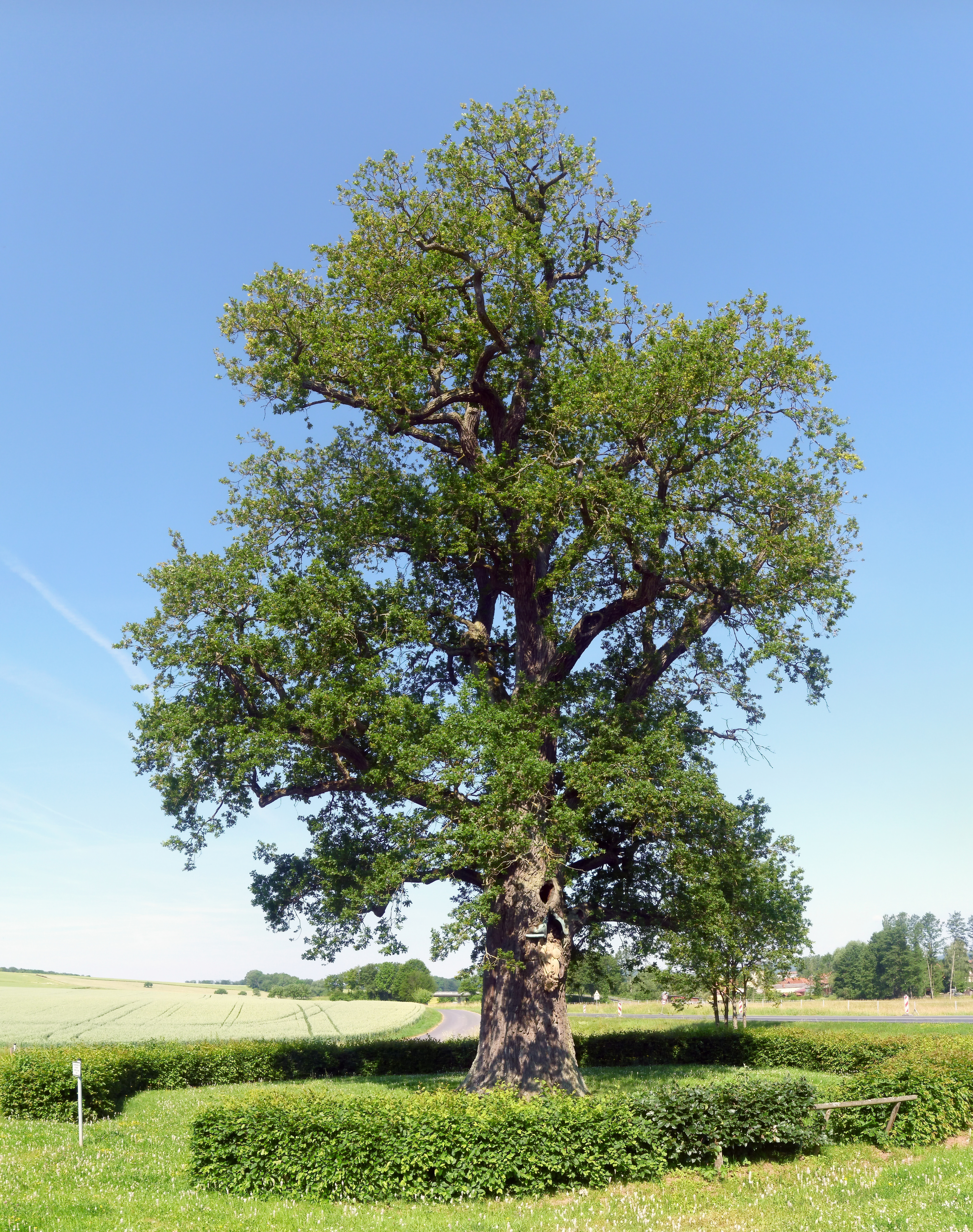 Die Bildeiche (auch Michaelseiche genannt) mit dem Erzengel Michael, steht etwa 500 Meter südöstlich von Albertshausen, einem Ortsteil von Bad Kissingen, auf etwa 300 Meter über Normalnull. Die etwa 400 Jahre alte Stieleiche (Quercus robur) ist seit dem 11. Februar 1935 als Naturdenkmal geschützt und bei der Unteren Naturschutzbehörde des Landkreises Bad Kissingen mit der Nummer 672-N/027 und der Bezeichnung Bildeiche gelistet. Im Jahr 2009 hatte der Stamm in einem Meter Höhe einen Umfang von 8,00 Meter bei einer Höhe von 25 Meter.